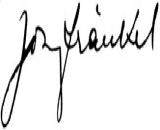 Josef Fränkel: Theodor Herzl. Wien : Fiba, 1934 Titelblatt mit zweizeiliger eh. Widmung von Josef Fränkel an einen befreundeten Rabbiner, dat. Wien, Mai 1937